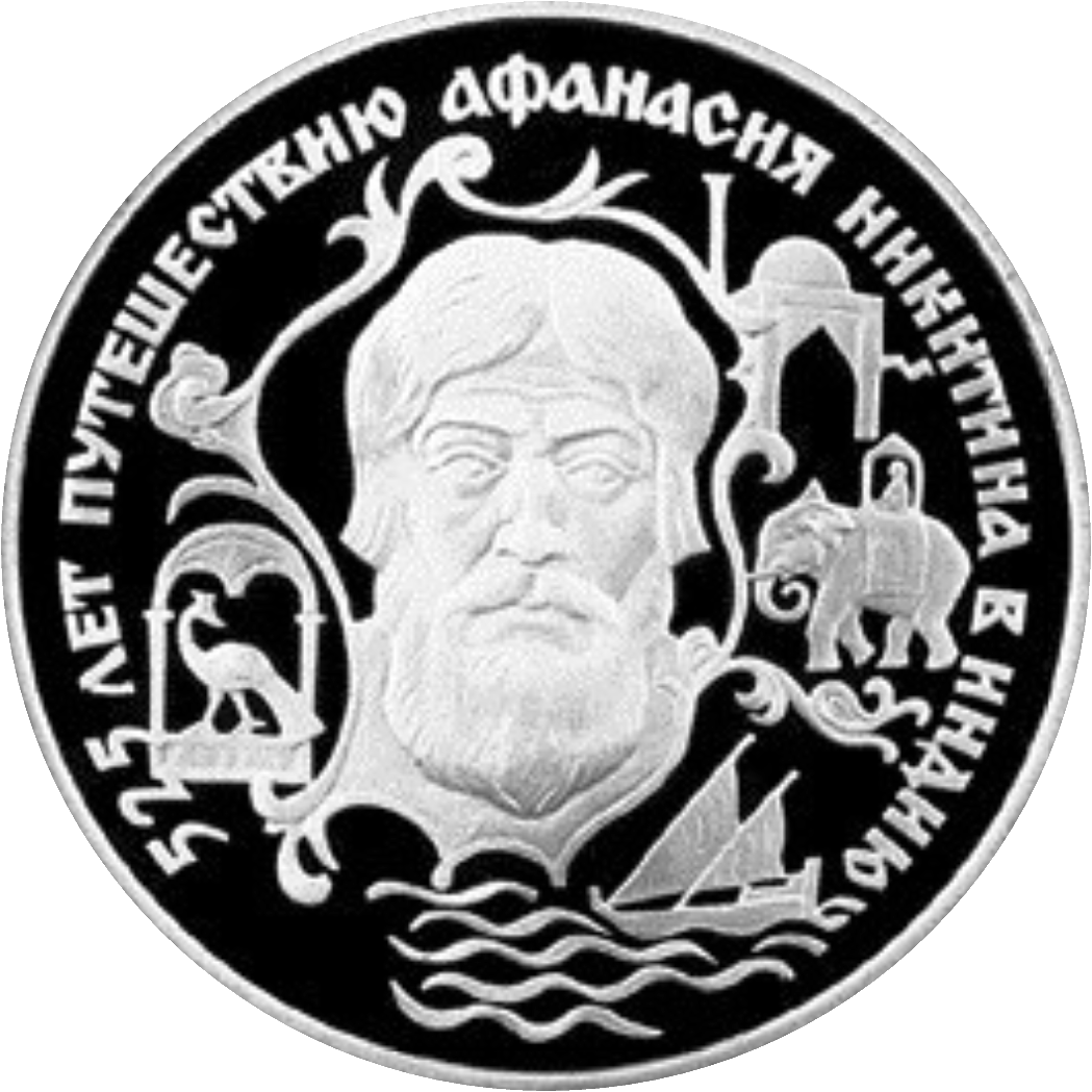 Монета Банка России — Серия: «Выдающиеся личности России», 525 лет путешествию Афанасия Никитина в Индию (2), 2 рубля, реверс.